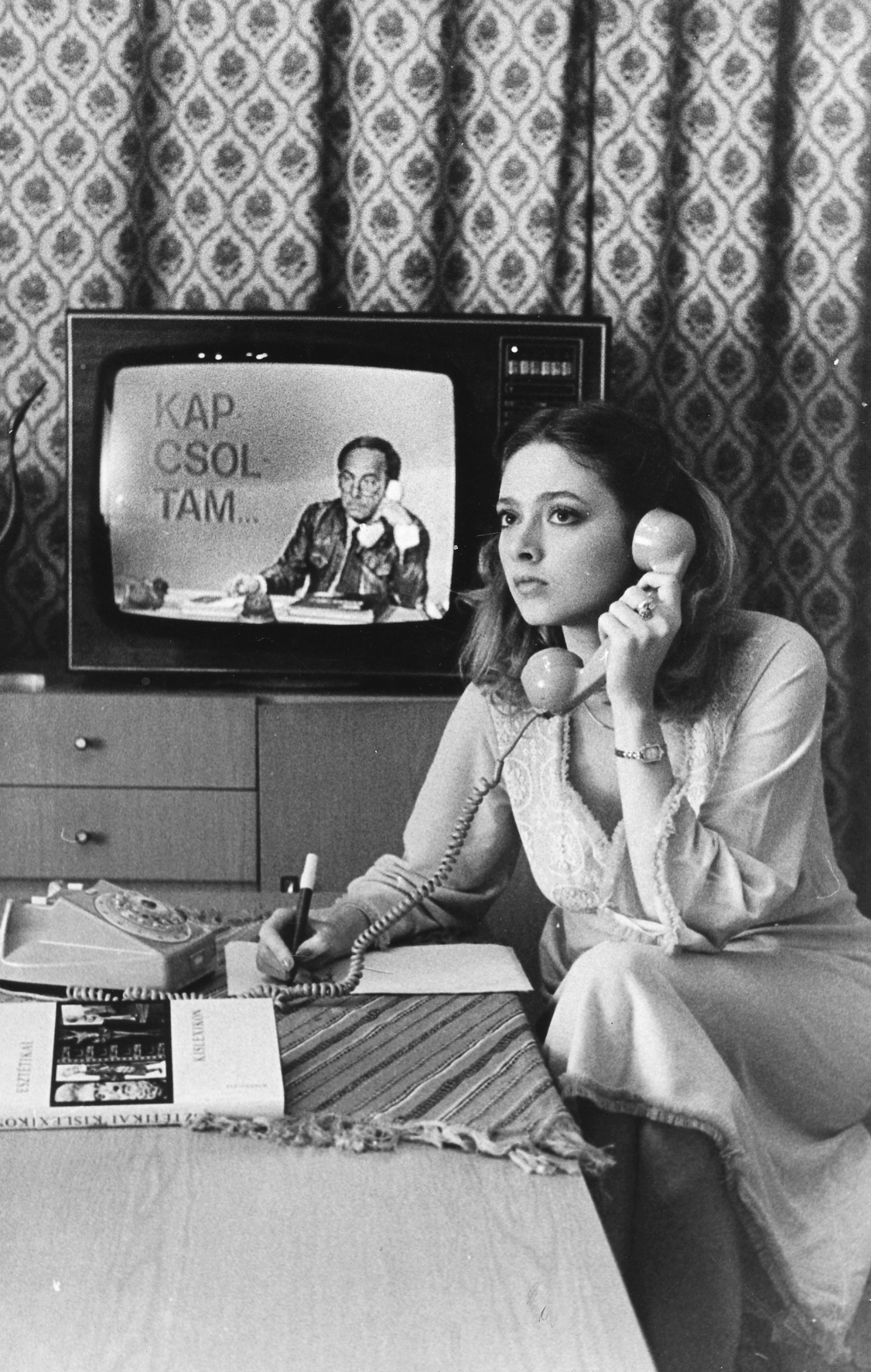 Rák Kati magyar színésznő. A háttérben Vitray Tamás Location: Hungary Tags: TV, telephone, television show